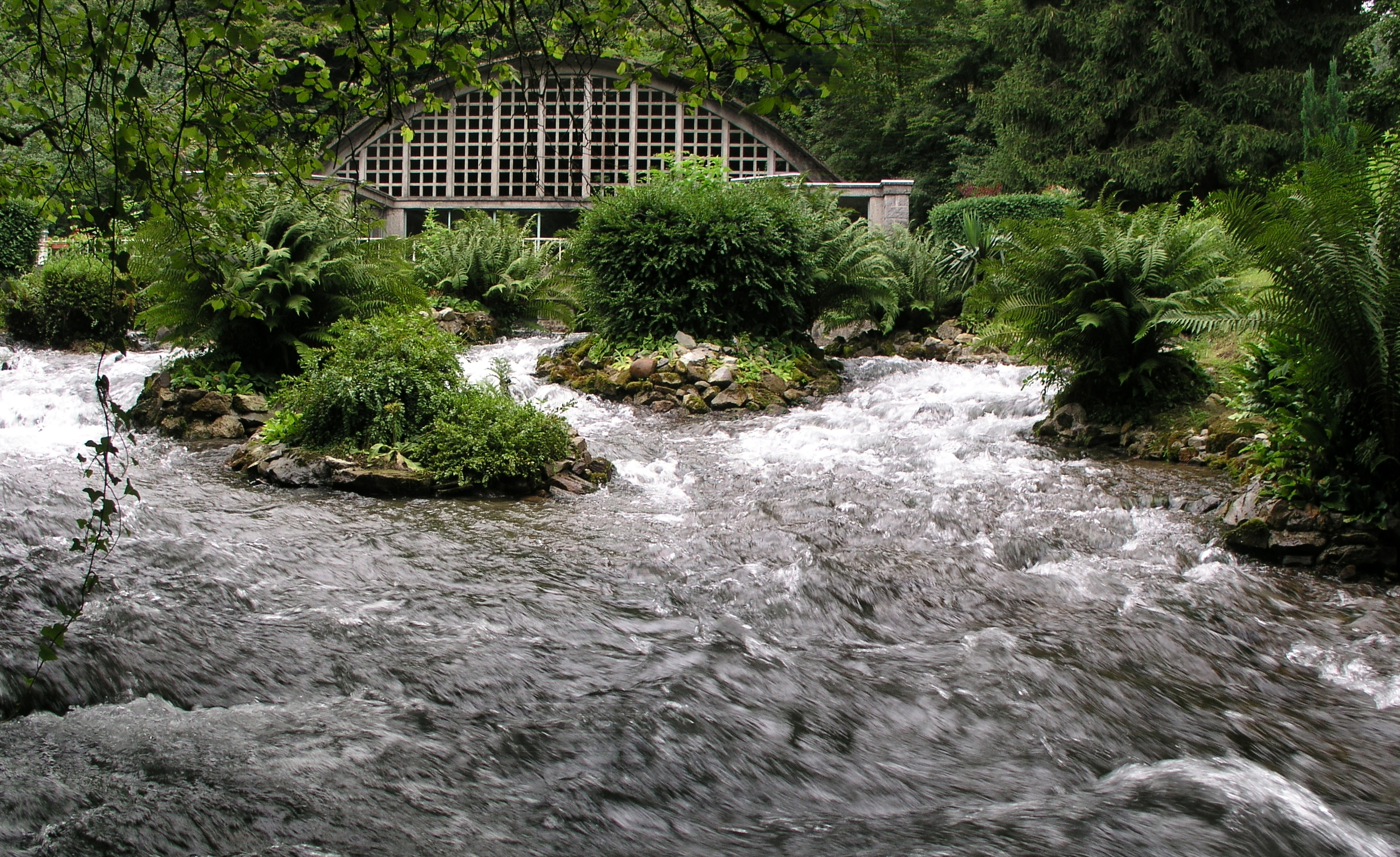 Oeil du Néez à Rébénacq